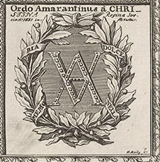 publié in : R.P. Honoré de Sainte Marie, Dissertations historiques et critiques sur la chevalerie ancienne et moderne, séculière et régulière, avec des notes, Paris, Giffart, 1718.